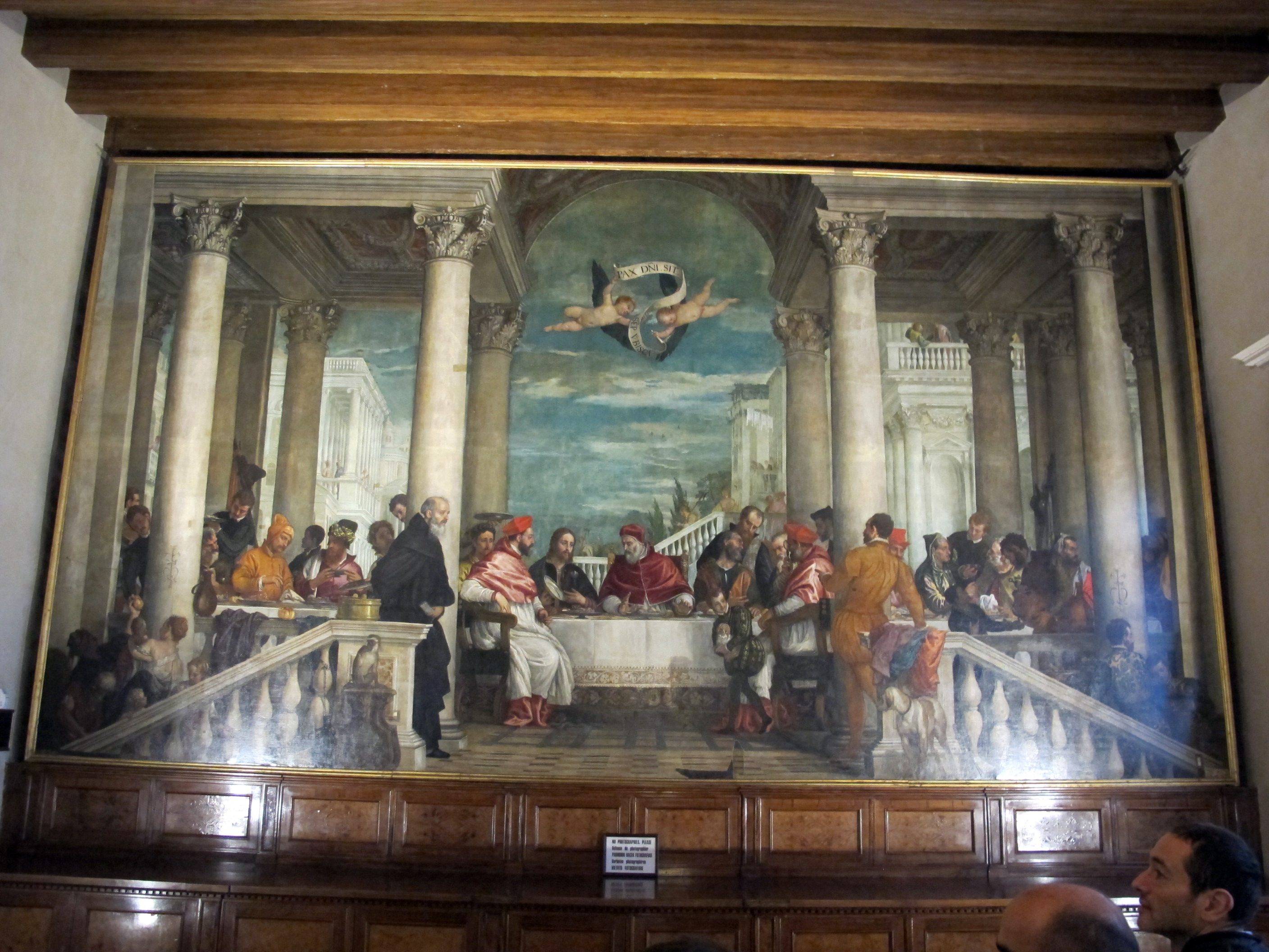 Paolo veronese, cena di s. gregorio magno